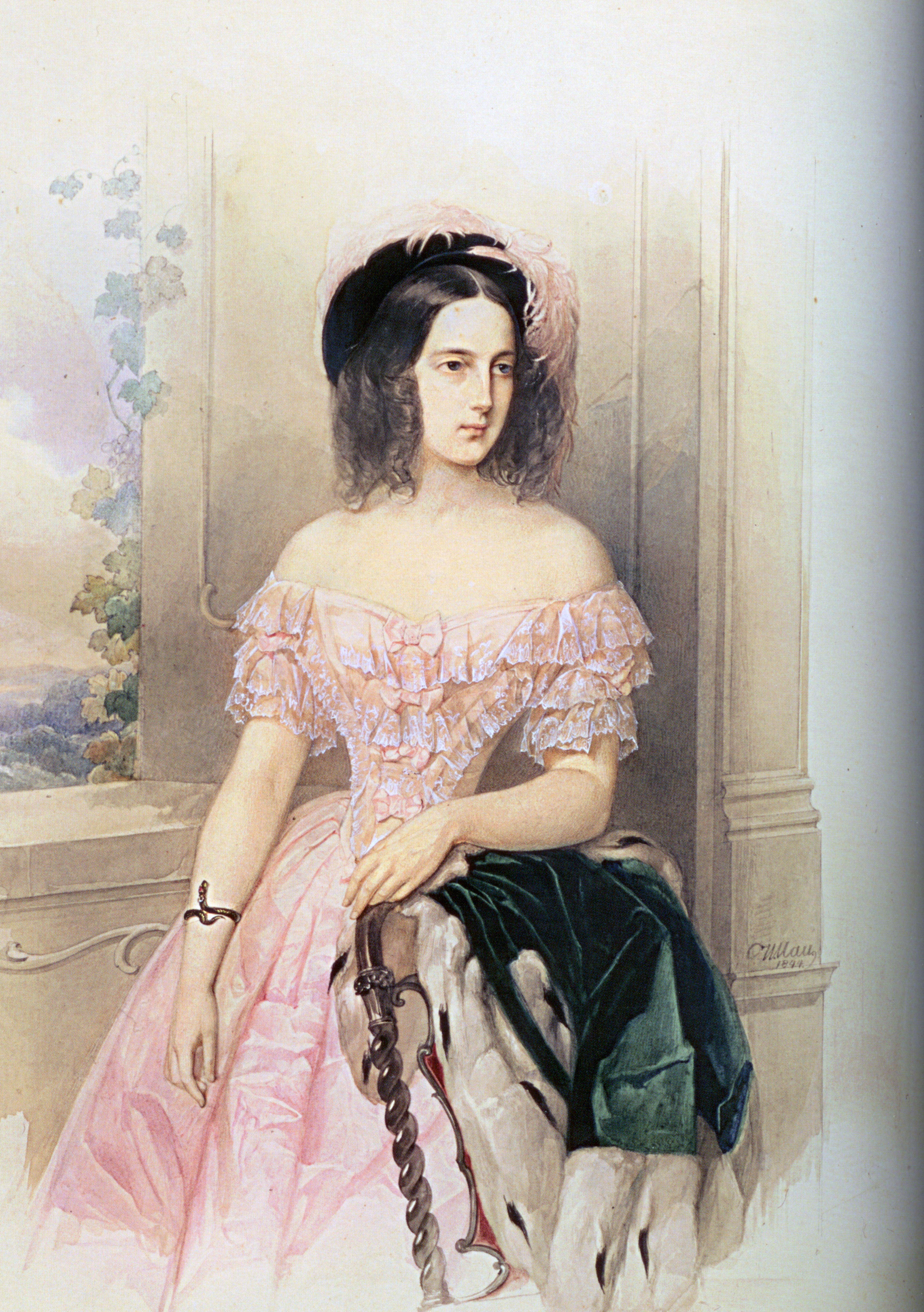 Великая княгиня Мария Николаевна